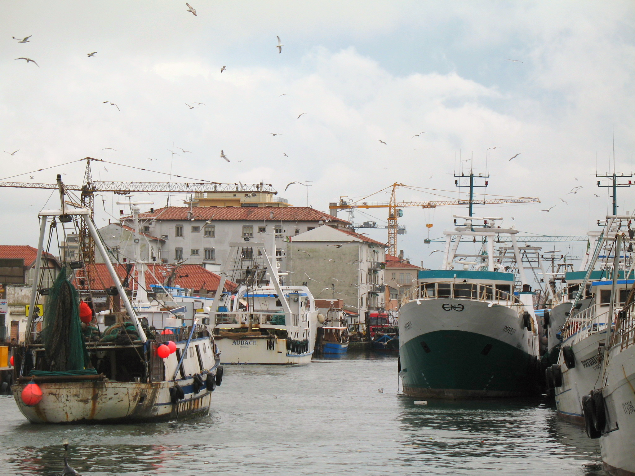 Chioggia, laguna veneta